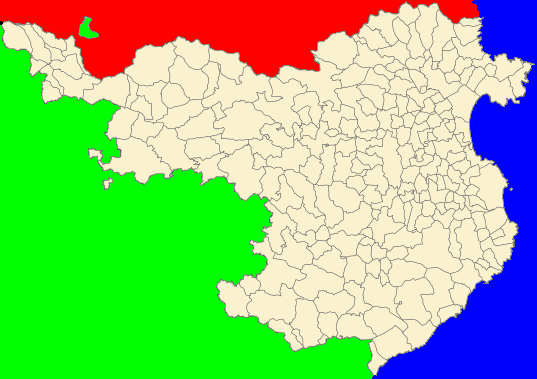 Municipio de Llívia/Llivia respecto a la provincia de Gerona (España)